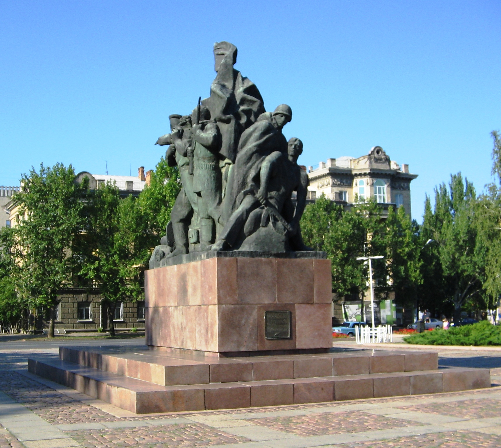 Памятник десантникам Ольшанского в Николаеве